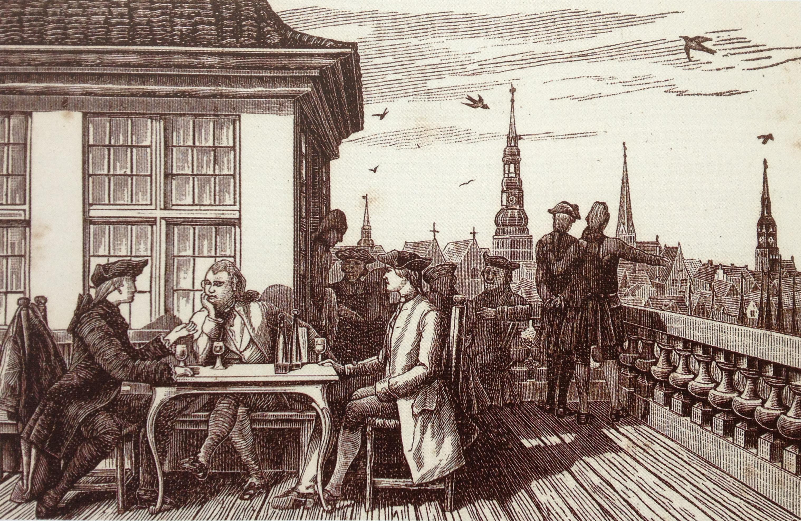 Galerie des Baumhauses in Hamburg mit Lessing (Mitte), Herder und Claudius